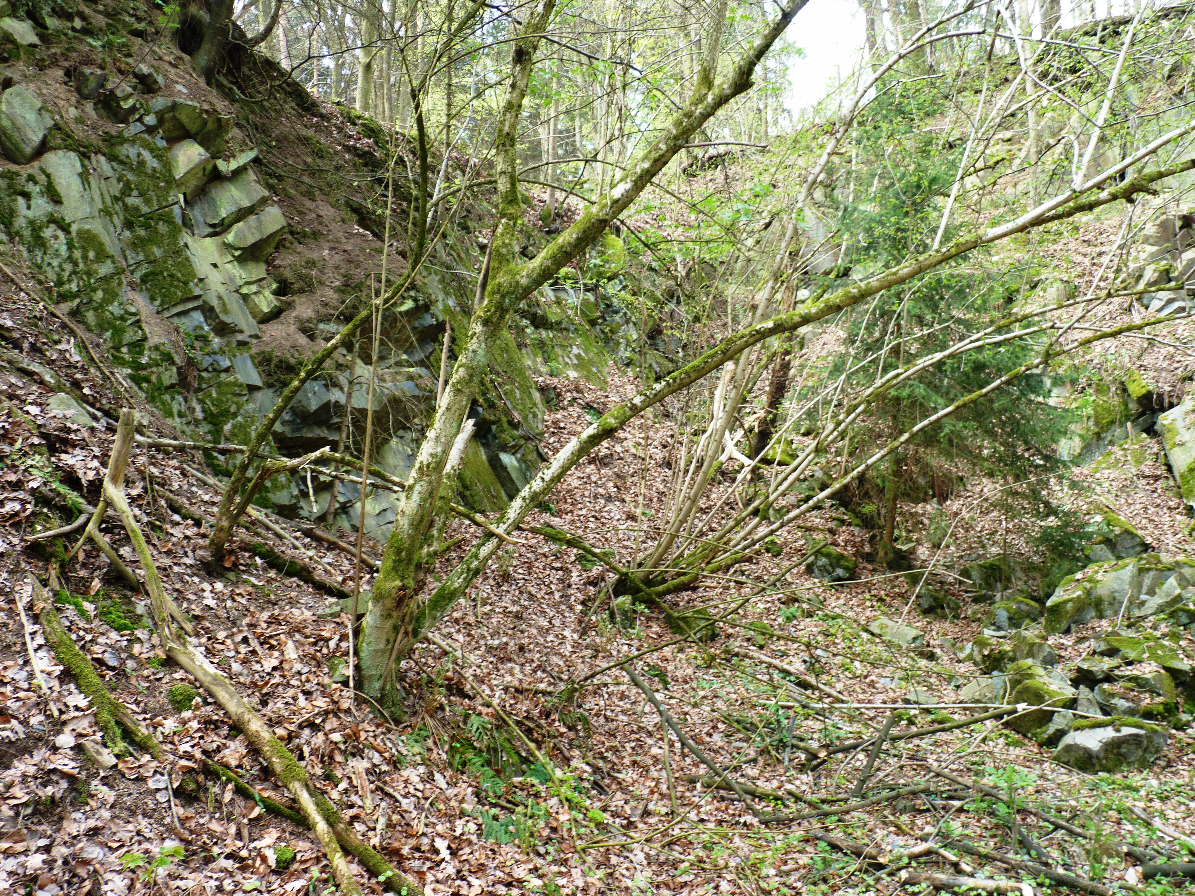 Přírodní památka, opuštěný lom U Radošína.